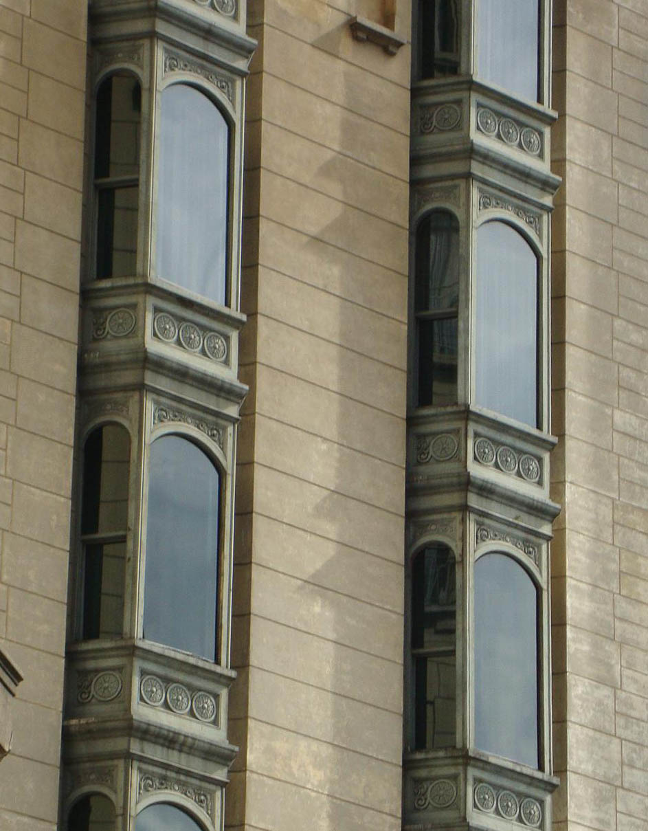 Ventanas del Marriott Plaza Hotel, inaugurado en Buenos Aires en 1909 como primer hotel de turismo de nivel internacional. Buenos Aires, Argentina.